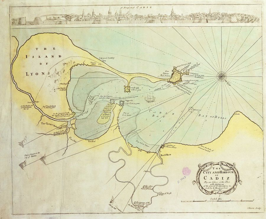 Disposición cartográfica de la Bahía de Cádiz